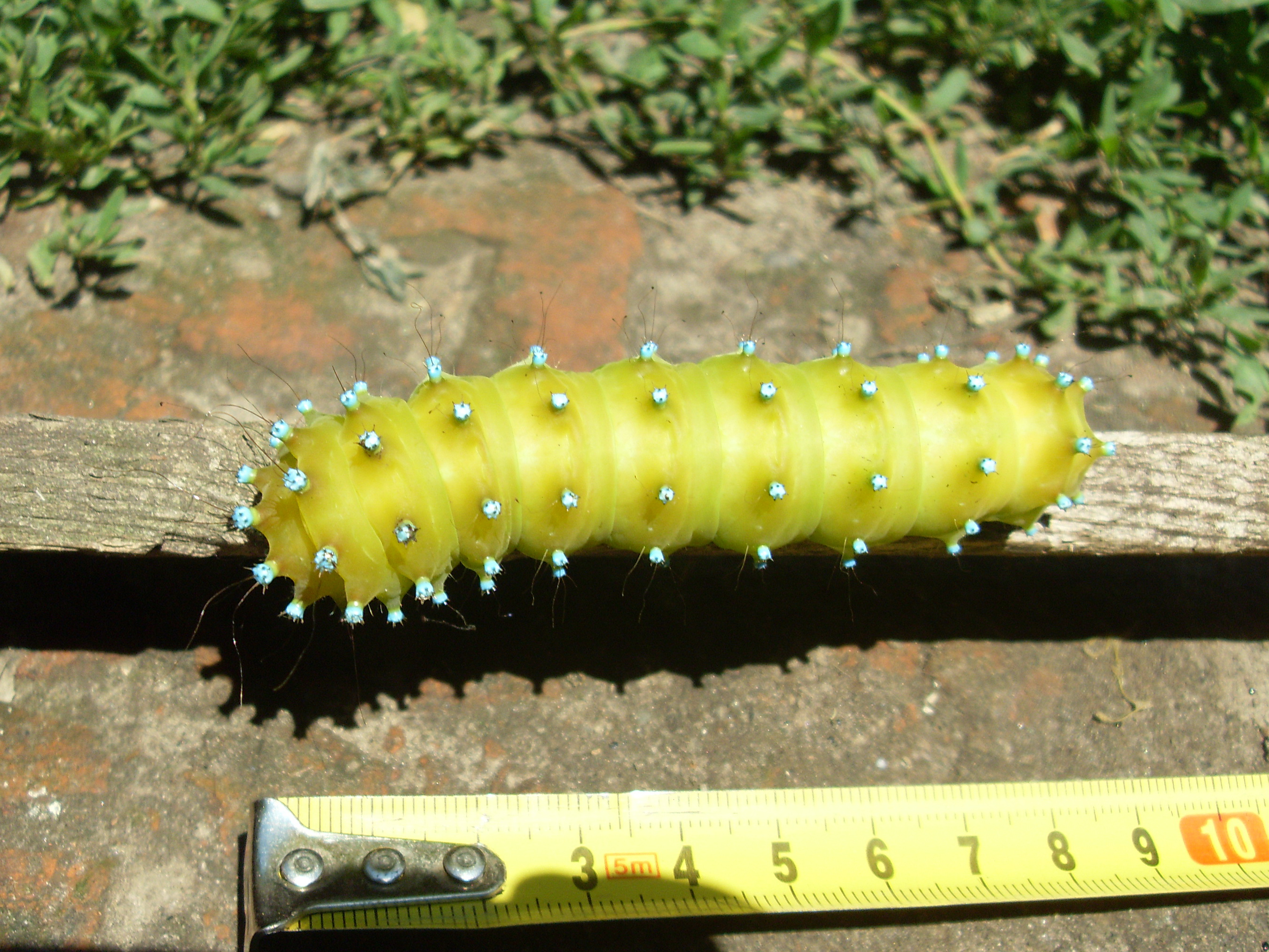 Україна. Київська область. Рогозів.